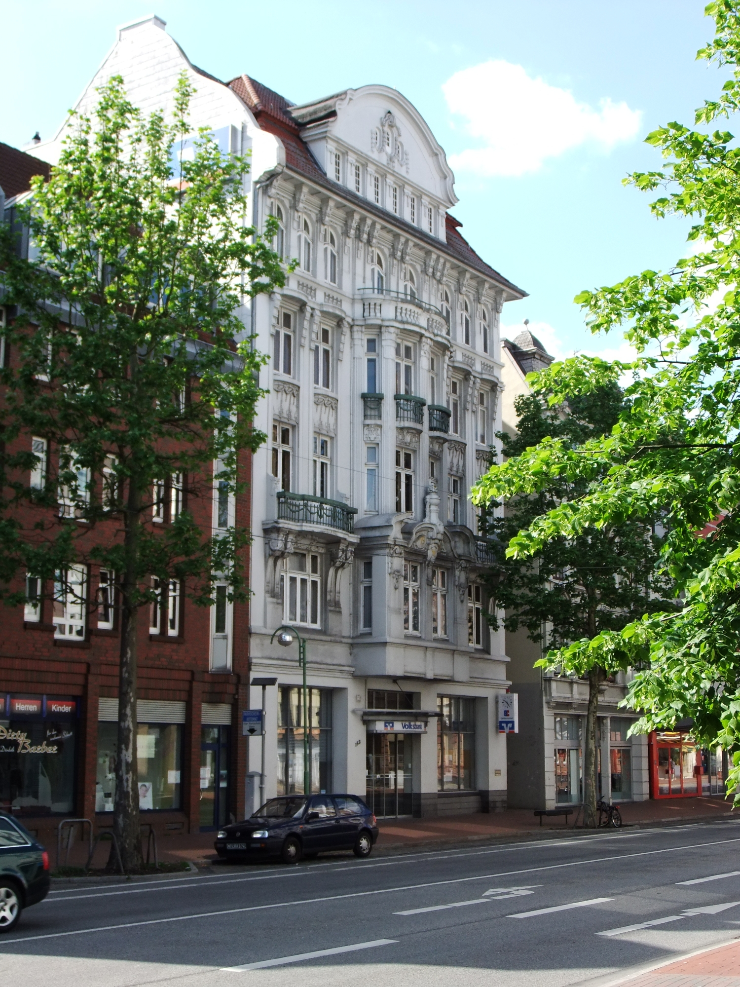 Wohnhaus in Bremerhaven, Hafenstraße 153. Das abgebildete Objekt ist ein geschütztes Kulturdenkmal in der Freien Hansestadt Bremen, mit der Nr. 1572 beim Landesamt für Denkmalpflege registriert.